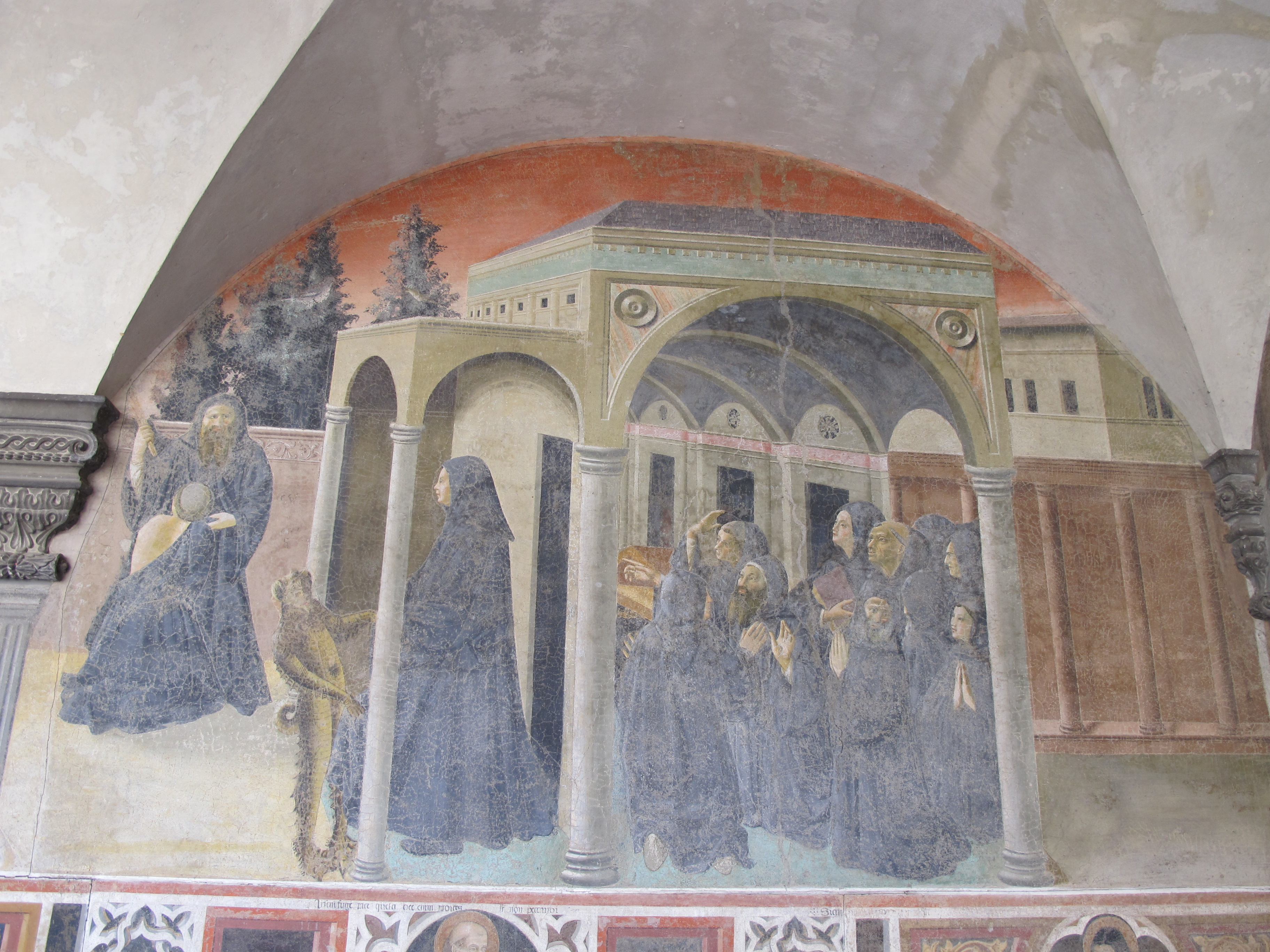 firenze 2011